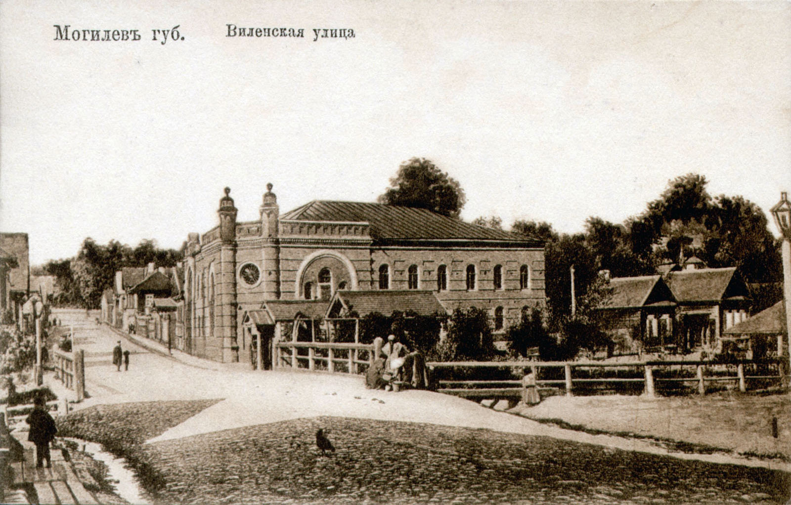 Беларуская (тарашкевіца): Магілёў (Mahiloŭ), вуліца Віленская (vulica Vilenskaja). Сынагога